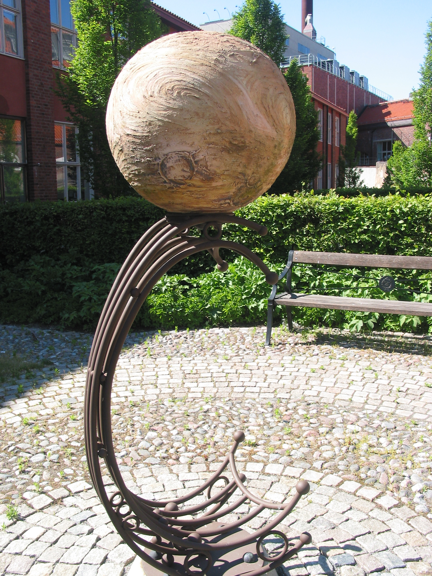 Venus - Kungliga Tekniska Högskolan, Stockholm - diameter 62 cm, 5,5 km från Globen